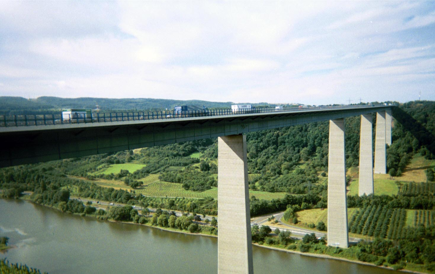 The Mosel valley in Germany. Taken Summer 2003. Die Brücke liegt zwischen den Gemeinden Dieblich und Winningen